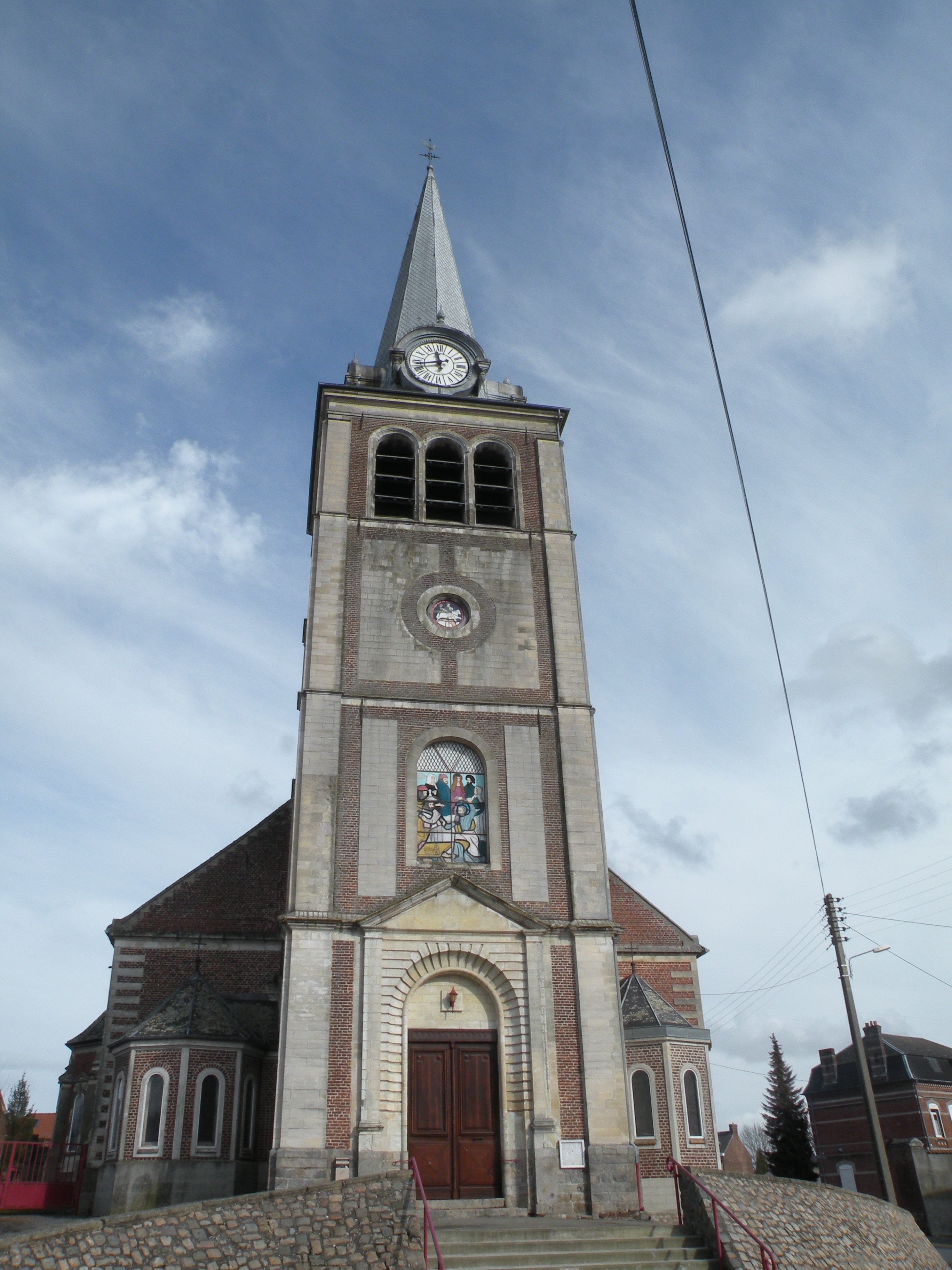 Iwuy église